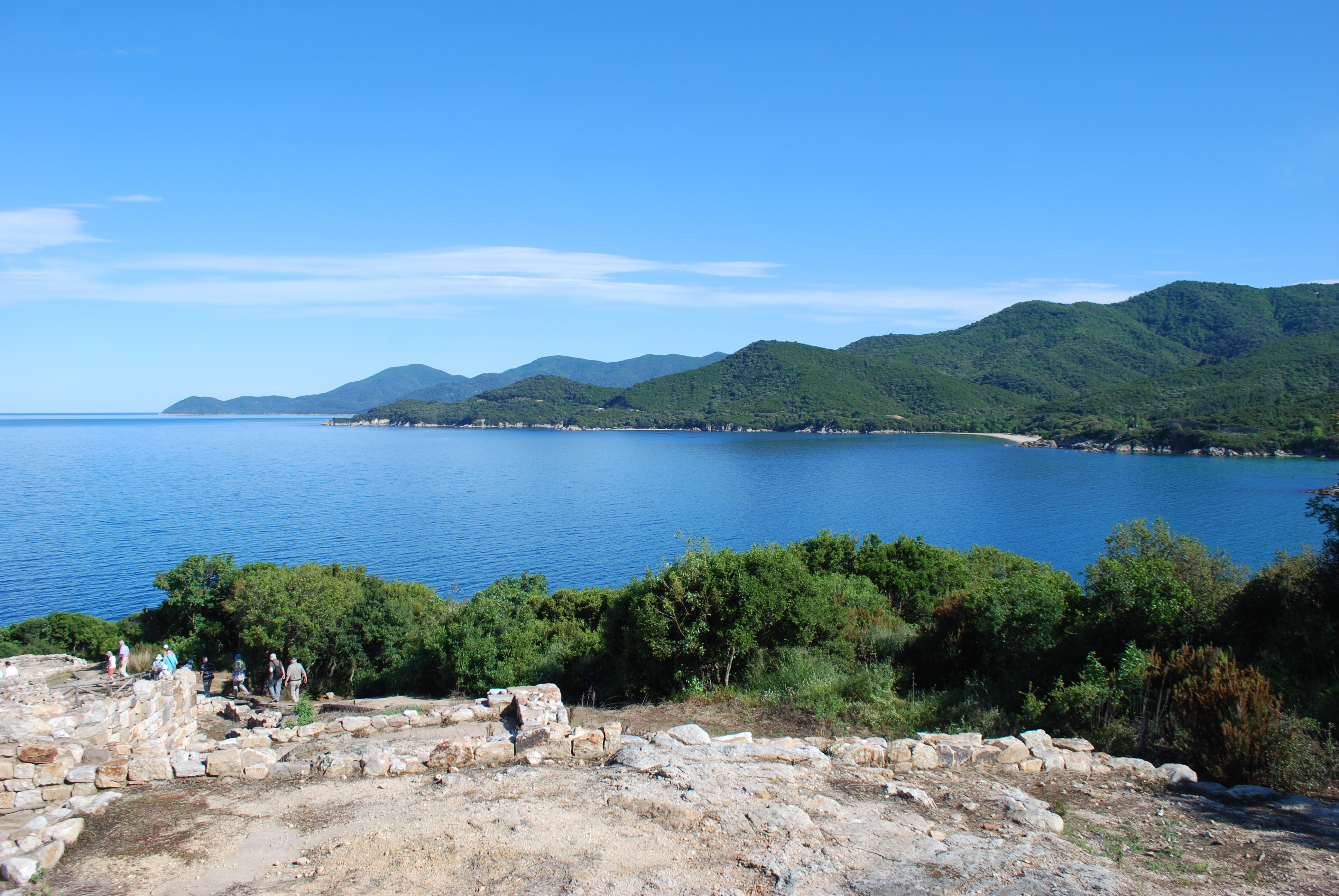 Vue du site archéologique de l'ancienne Stagire, ville natale du philosophe Aristote (Stagire, 384 av. J.-C. - Chalcis, 322 av. J.-C.).